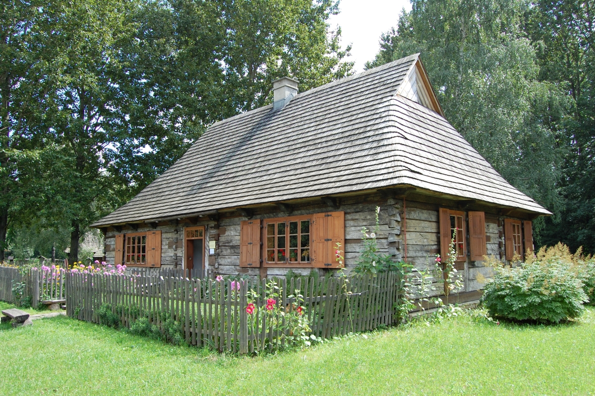 Chałupa wójta ze Strzemieszyc Wielkich (1877), Górnośląski Park Etnograficzny w Chorzowie